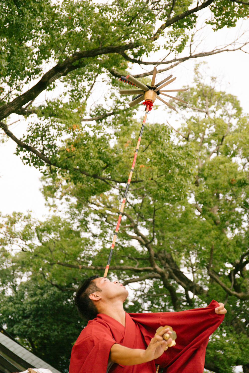 伊勢大神楽講社 社家である山本勘太夫。大阪府下にて総舞奉納の際に撮影。